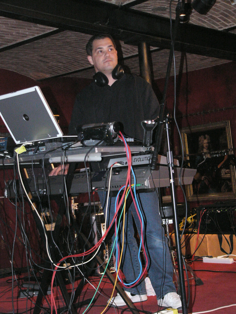 moonbooter